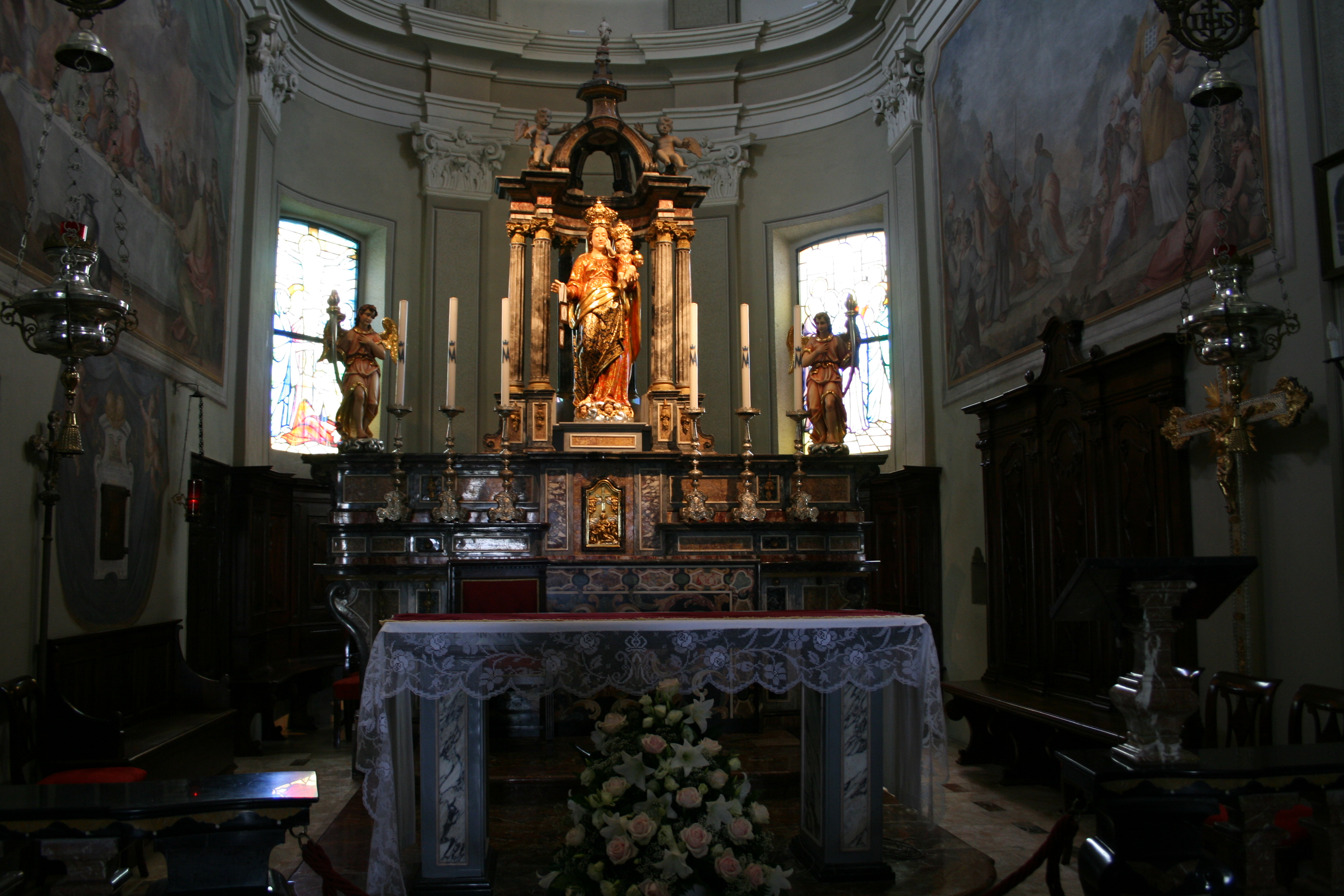 Montevecchia. Interno Santuario della Beata Vergine del Carmelo.